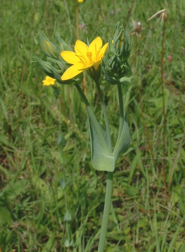 Blackstonie perfoliée Blackstonia perfoliata subsp. perfoliata, Bucey-lès-Gy, photo J.F. Gaffard, juin 2004.